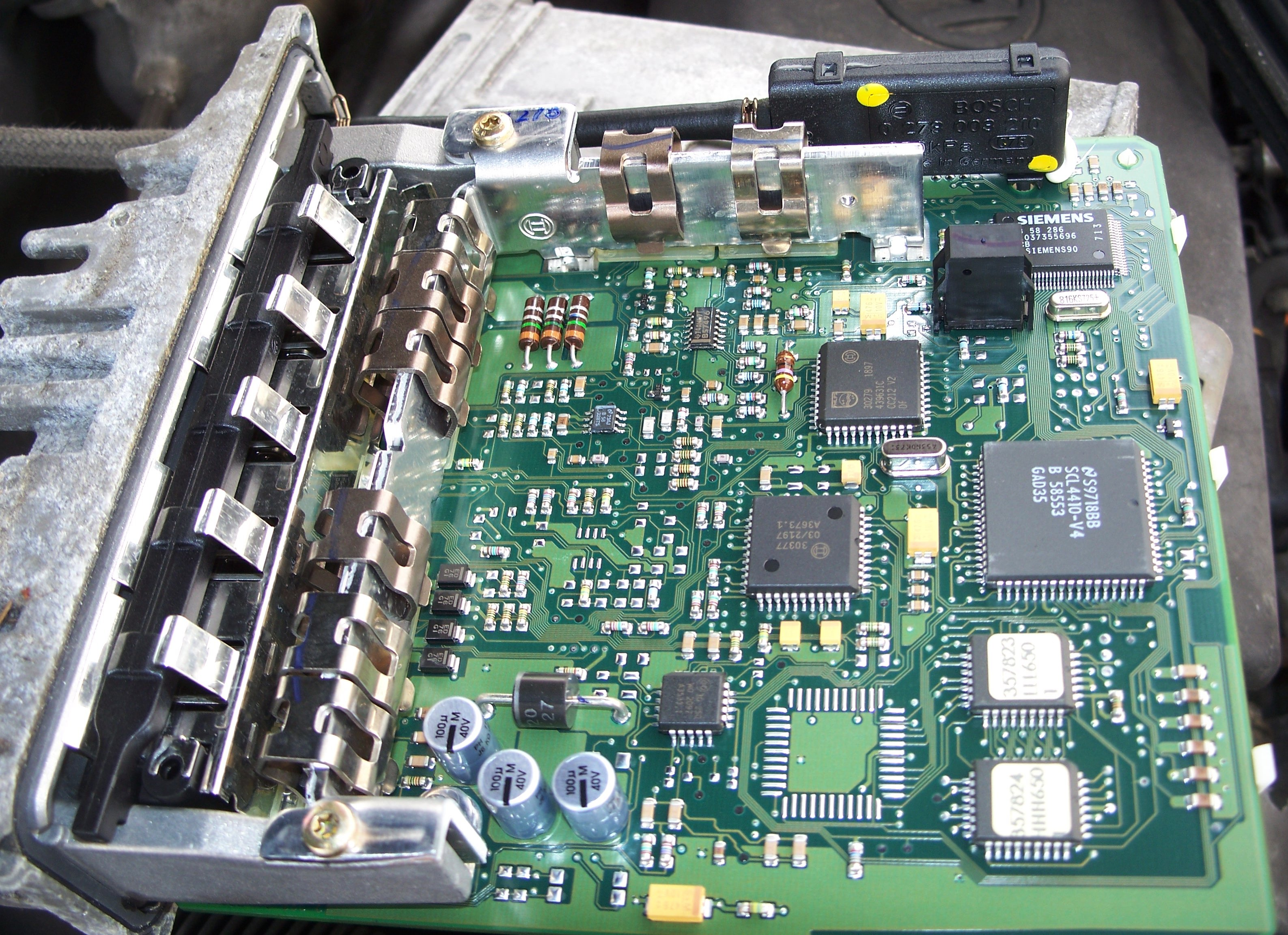 Innenansicht einer Motorsteuerung aus einen Golf III TDI. Links befindet sich die Steckerleiste, direkt daneben die auf Kühlblech montierten Leistungshalbleiter. Über den Schlauch und den MAP-Sensor wird der Ladedruck des Turboladers gemessen. Das schwarze Bauteil unterhalb des Siemens-Chips ist der Höhenstandssensor bzw. Absolutdrucksensor. Die beiden Chips am unteren rechten Bildrand beinhalten das Motorkennfeld.